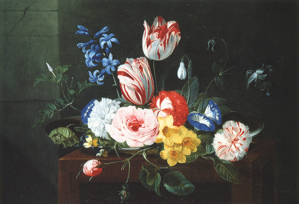 Assiette de fleurs posée sur un entablement